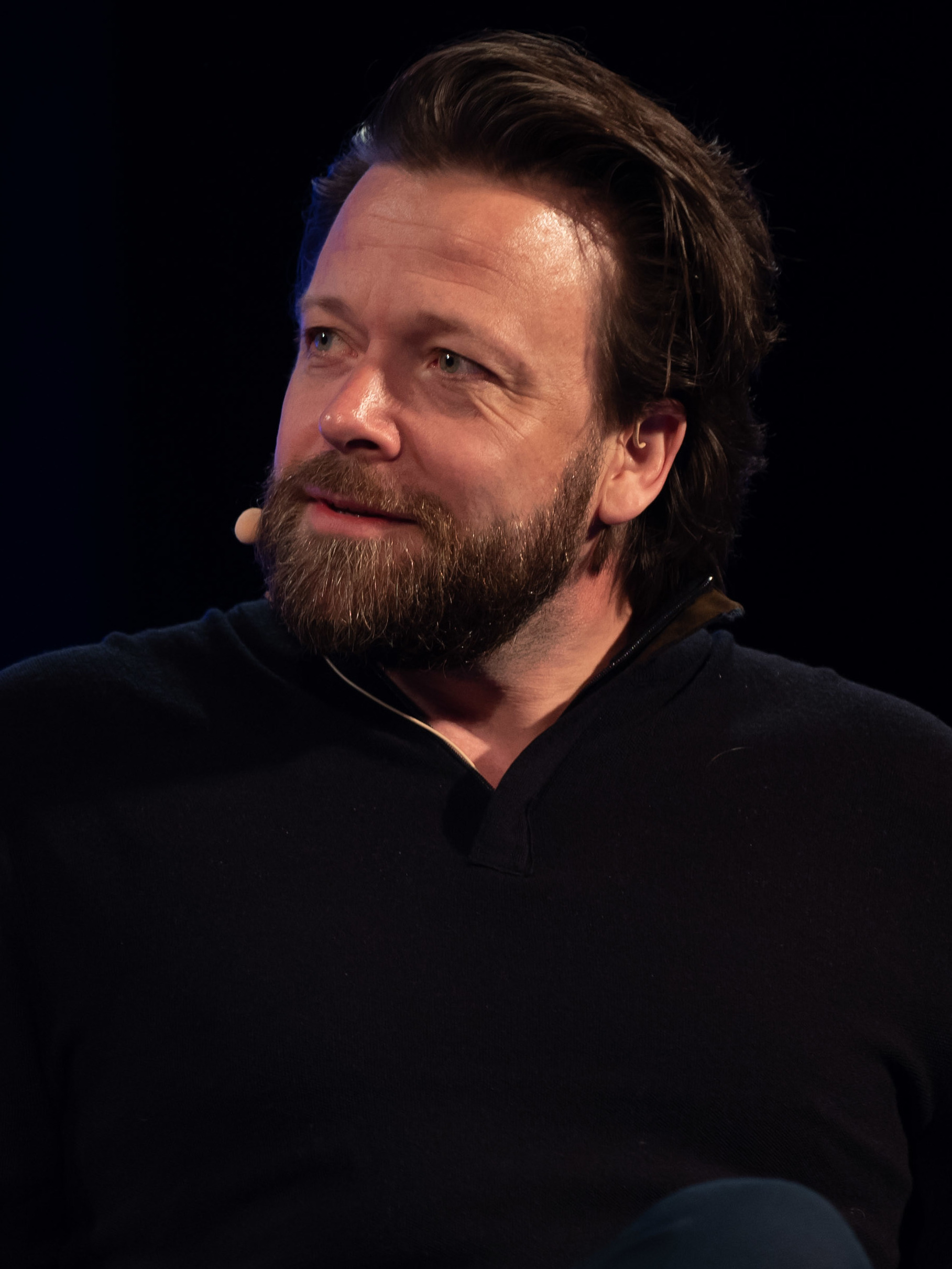 Vikingane - Tospråklig humorsuksess. Kristine Riis, Kåre Conradi.